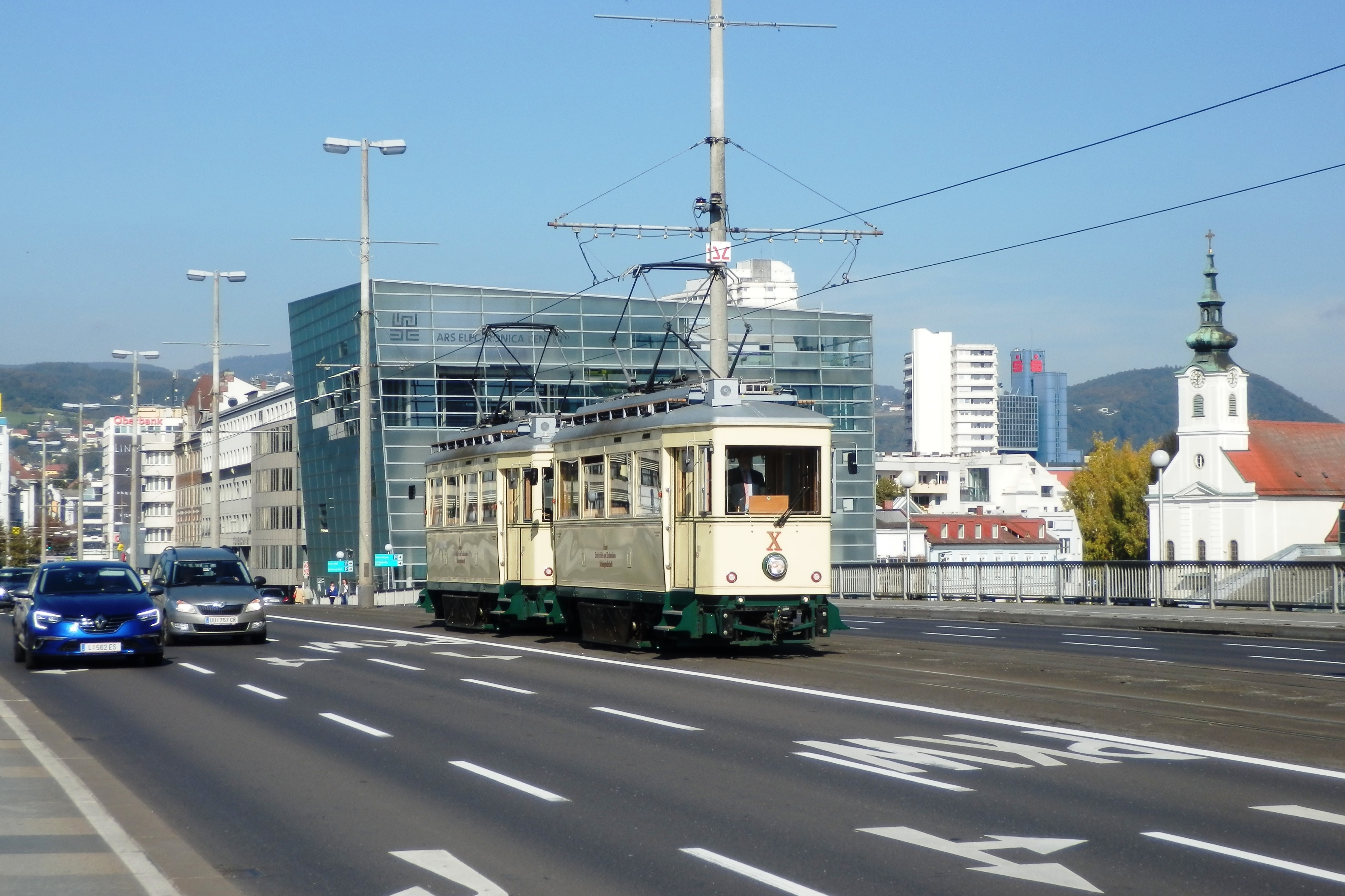 Linz AG Linien Pöstlingbergbahn Triebwagen X + VIII Richtung Hauptplatz, auf der Nibelungenbrücke